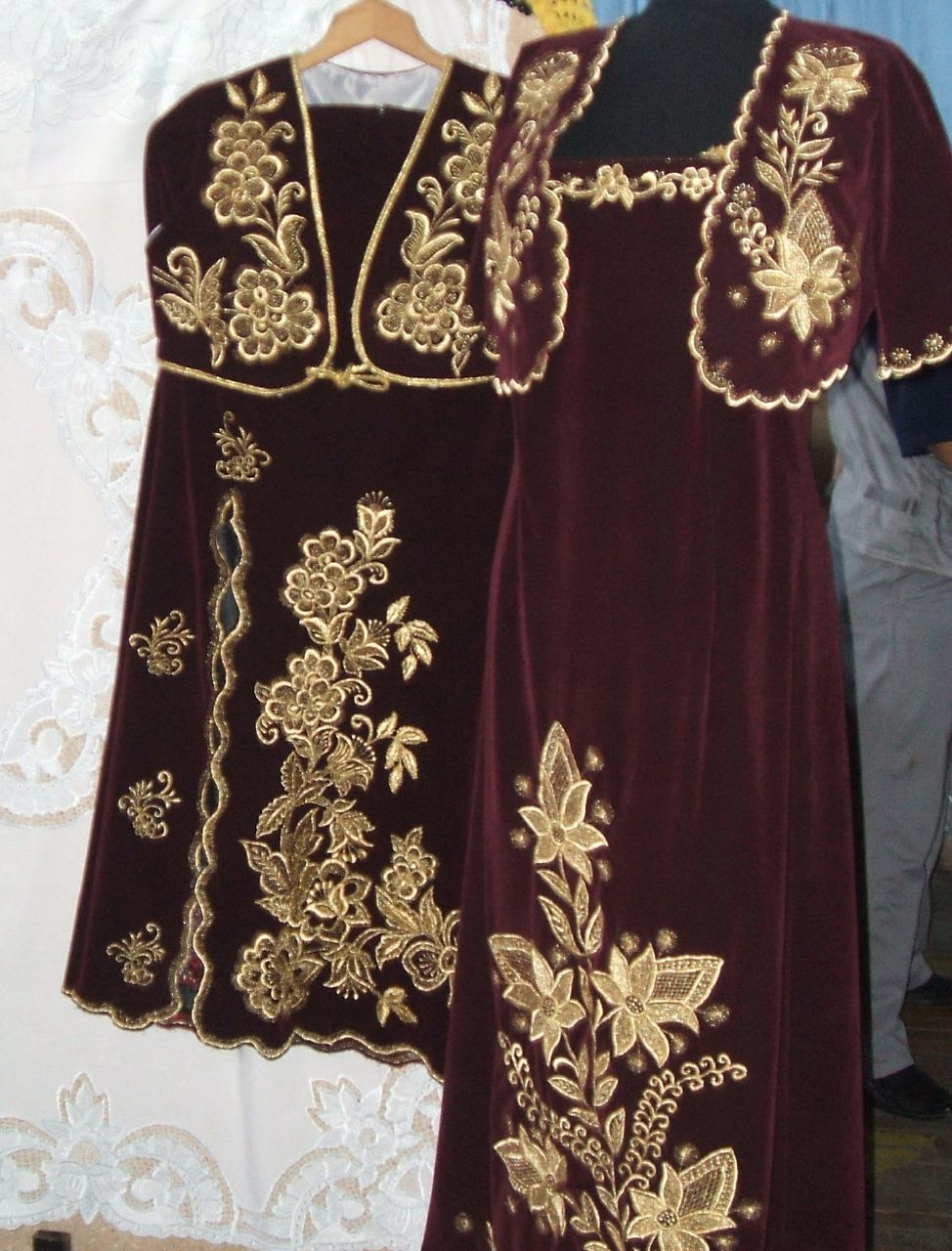 Kostume popullore